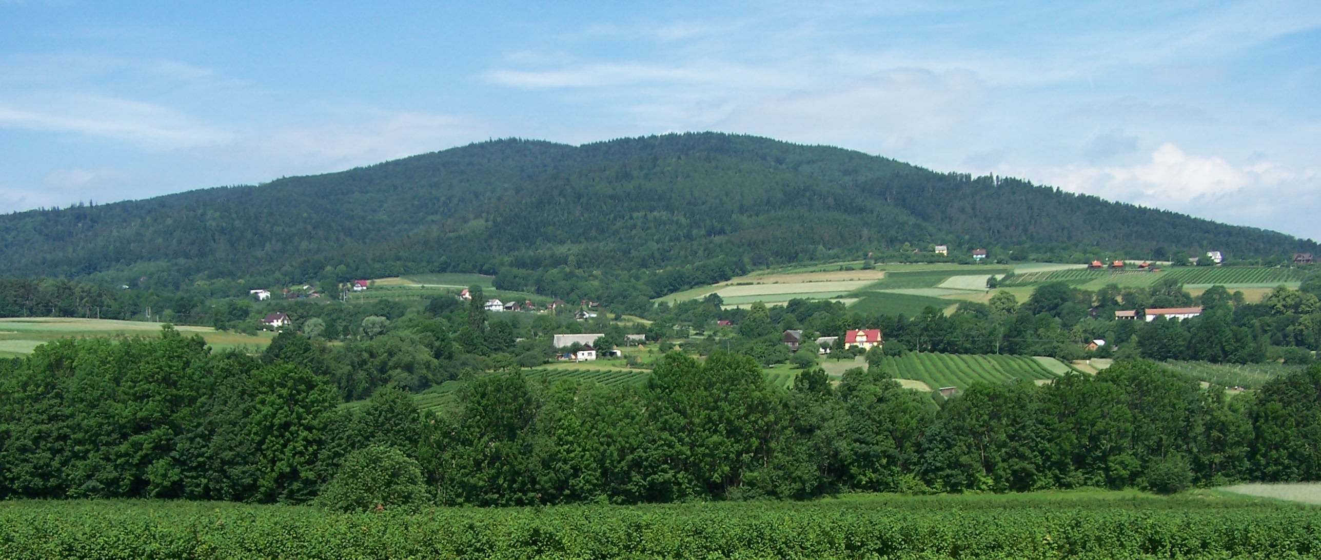 Ciecień (Beskid Wyspowy)